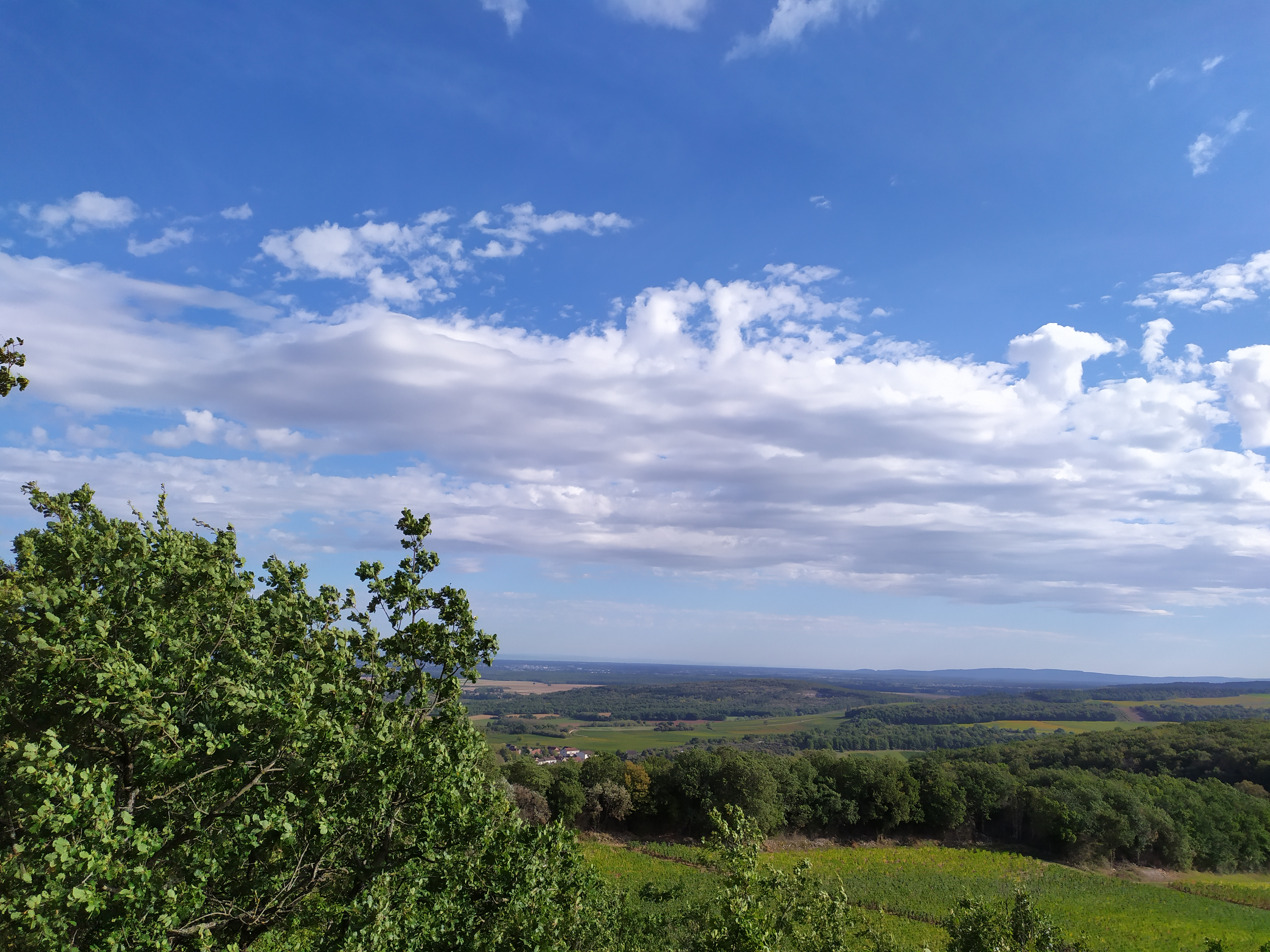 Vue depuis la montagne de Rully Vignes en contrebas